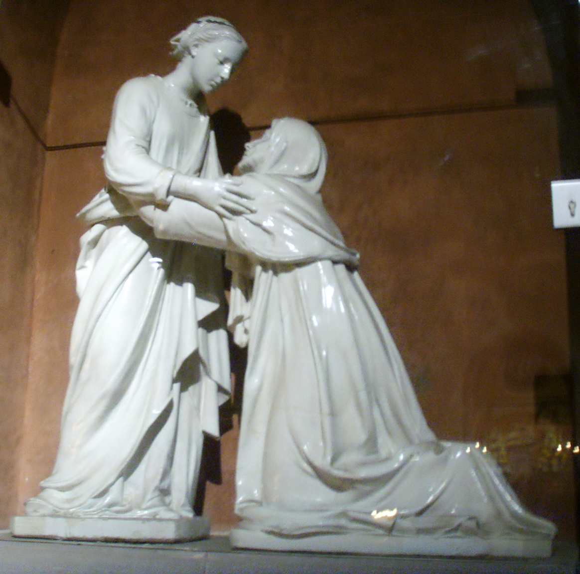 Pistoia, san giovanni fuorcivitas, visitazione di luca della robbia 1445 ca.